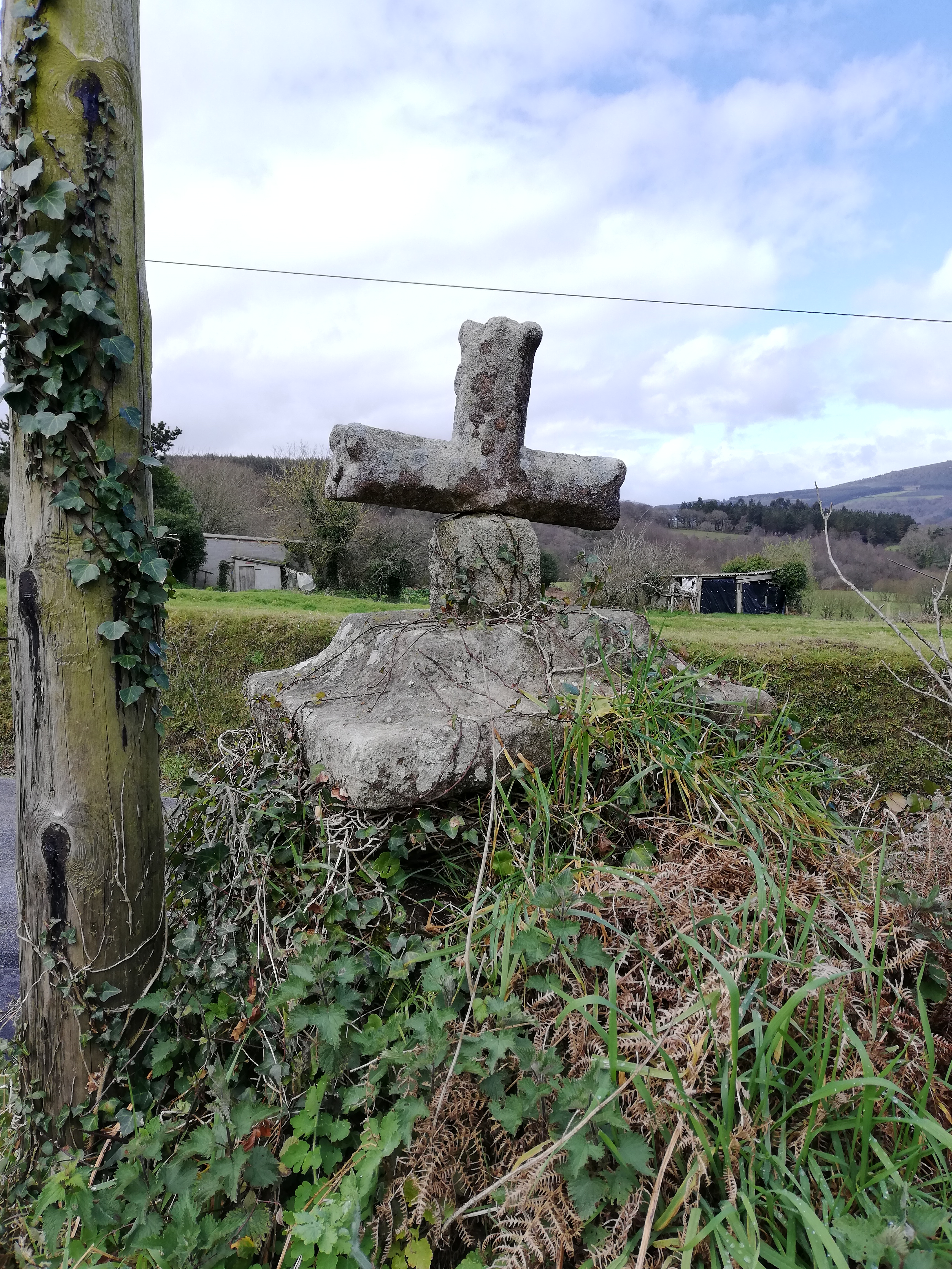 Cruz de pedra en Fraiás, Abadín.